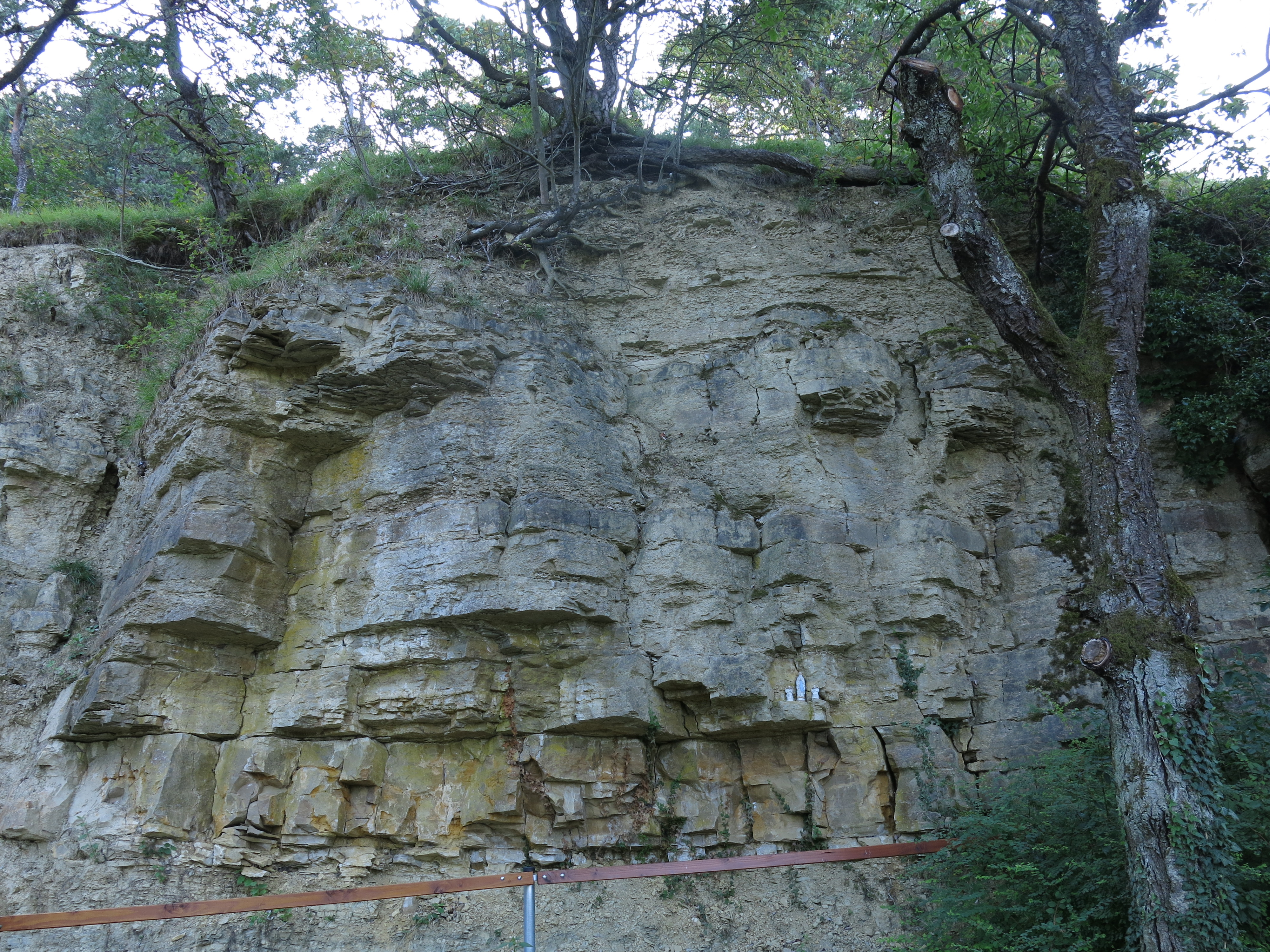 Steinbruch am Grainberg südl. Gambach